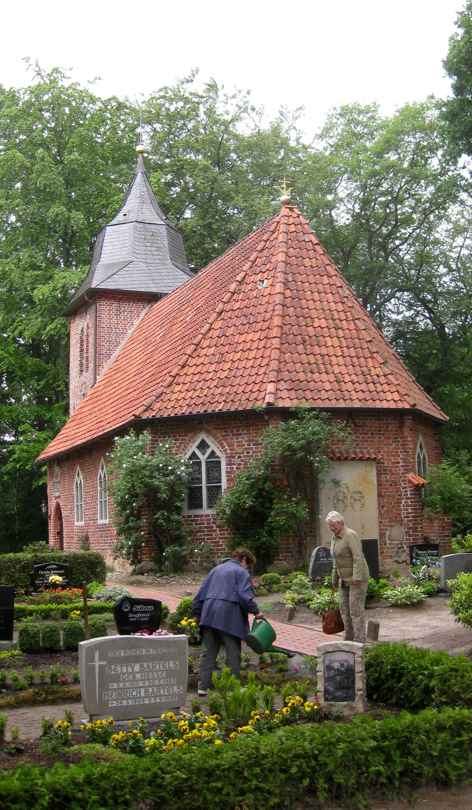 St. Christophoruskirche in Oese (Ortsteil von Basdahl)